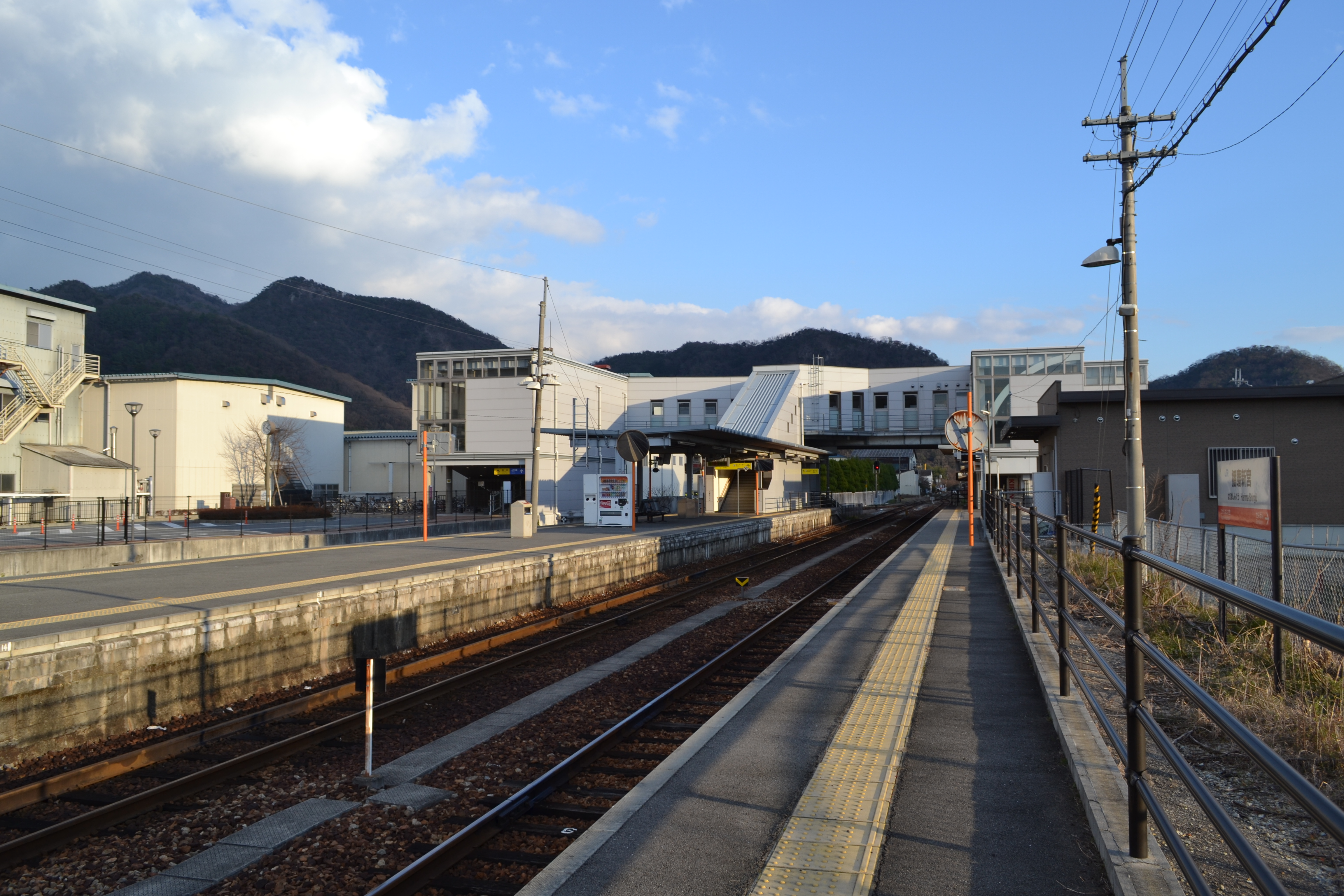 播磨新宮駅1番ホーム